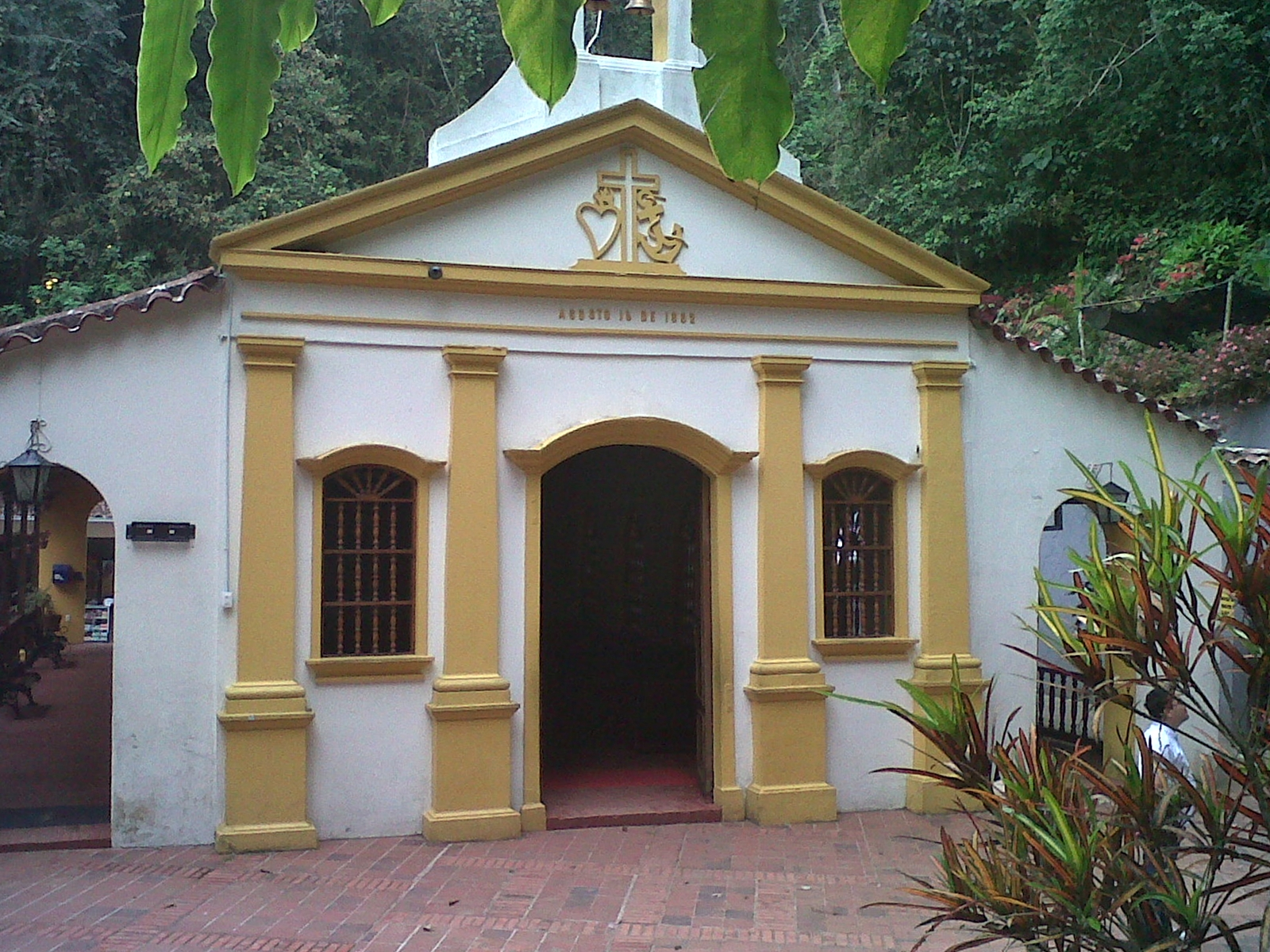 Meta para los devotos tradicionalista, que después de un largo viaje por el camino de herradura logran su objetivo de pagar o pedir una promesa a la virgen de torcoroma.